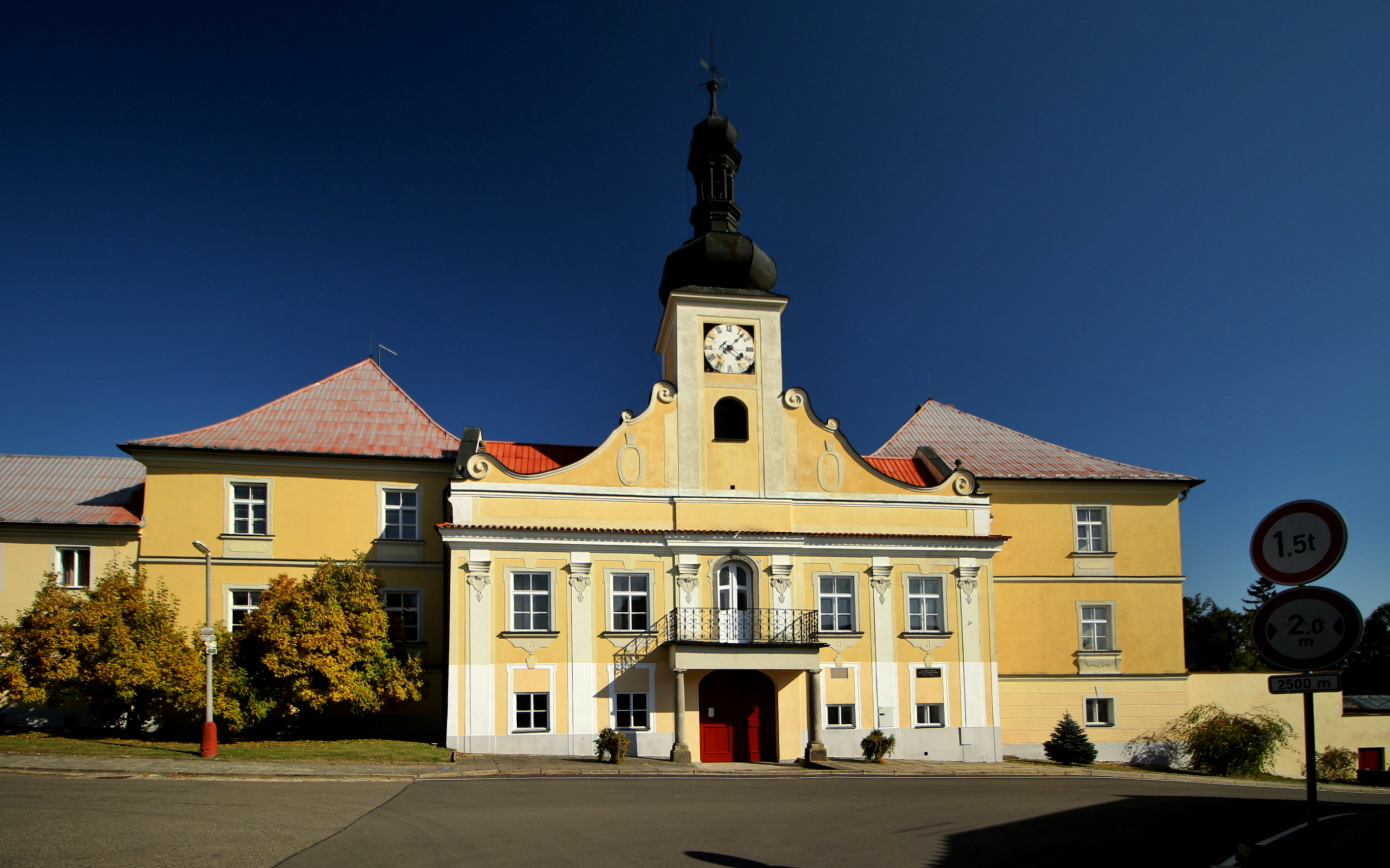 Stádlec náměstí a zámek